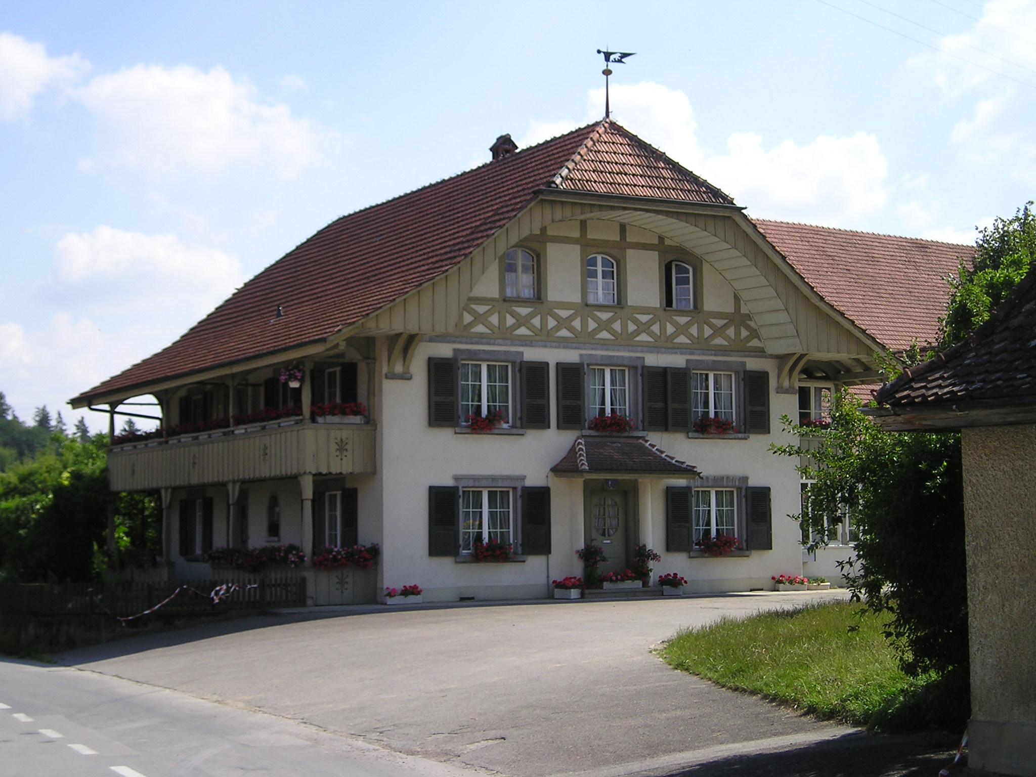 Altes Bauernhaus in Wileroltigen BE CH